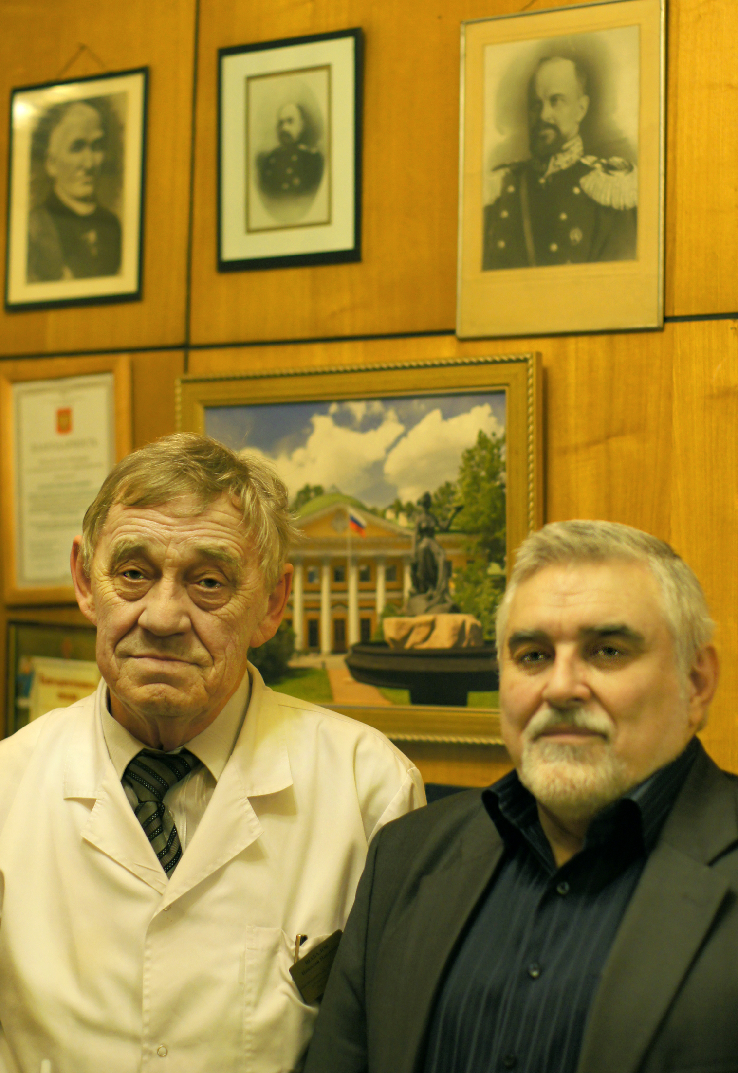 Профессор кафедры детских болезней ВМА Н. П. Шабалов и правнук профессора А. Н. Шкарина - Сергей Александрович Шкарин